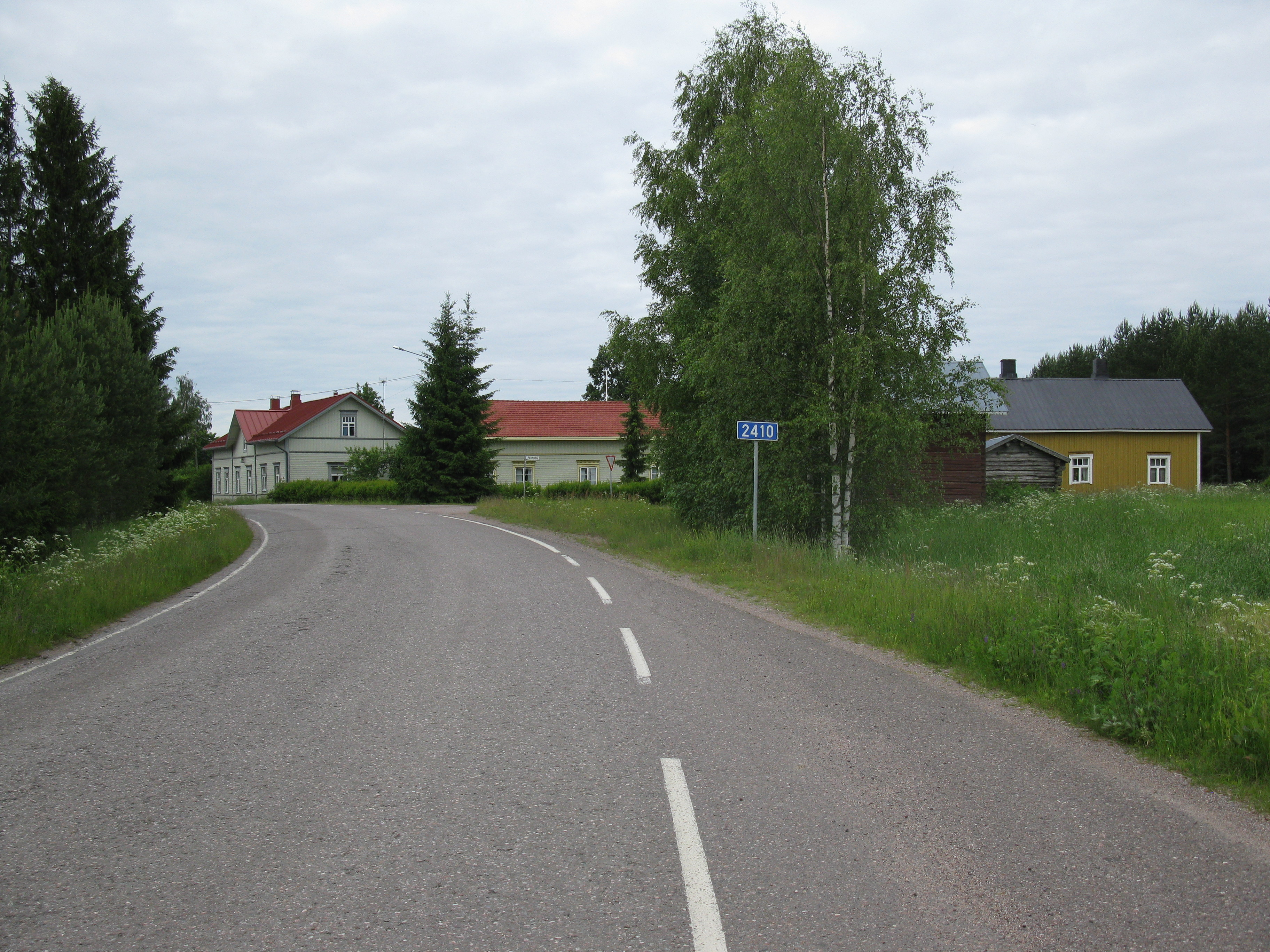 Terttilän kylää Somerolla. Keskellä Kaapon talo kylän vanhalla tontilla yhdystien 2410 varrella.